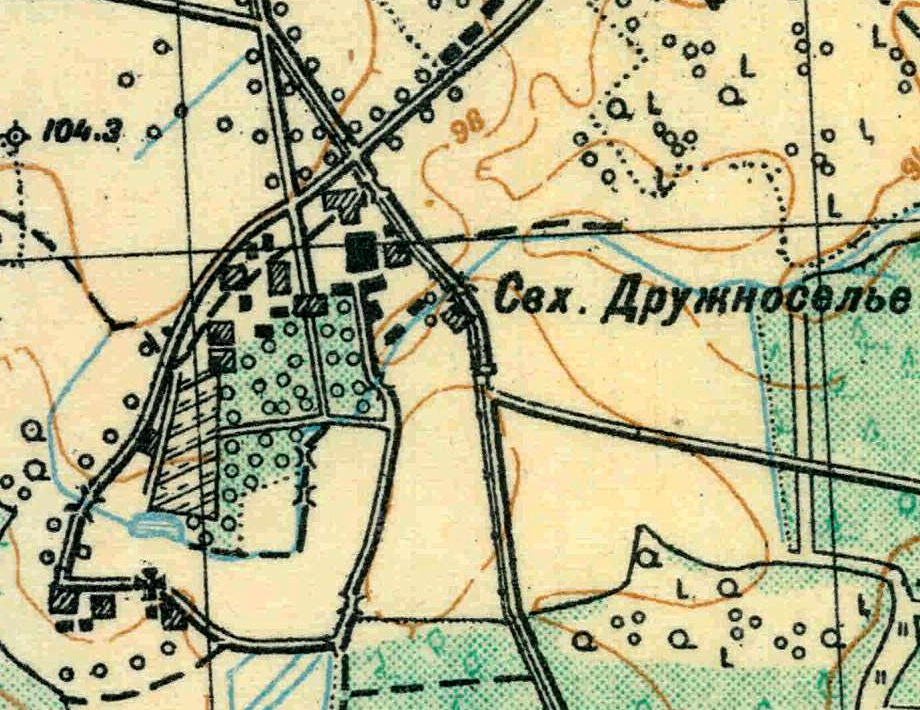 Топографическая карта Ленинградской области, квадрат О-36-25-А-а (Лампово), посёлок Дружноселье